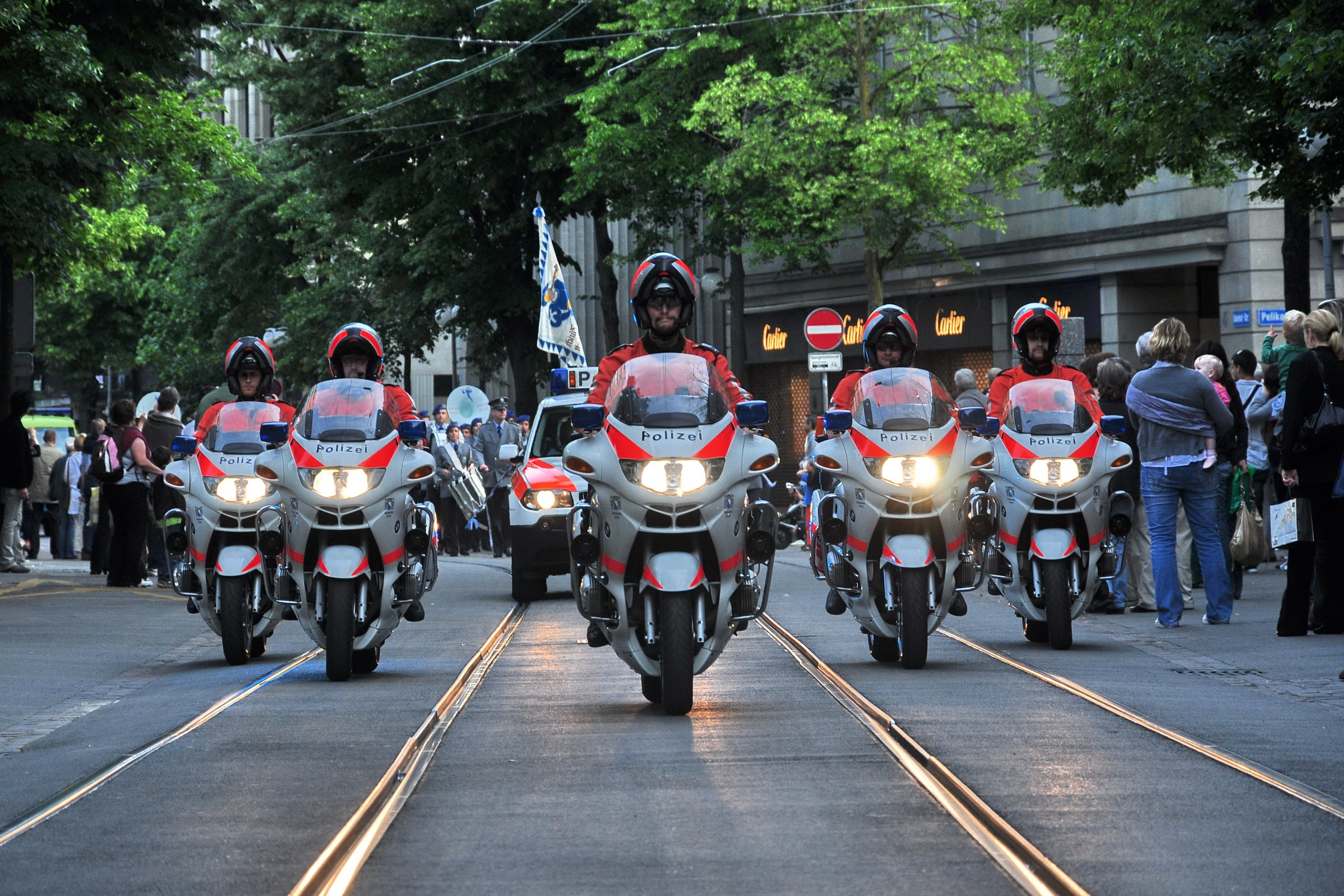 10 Jahre SRZ Jubiläumsanlass (13. und 14. Mai 2011) von Schutz & Rettung, Oldtimertreffen von Feuerwehrfahrzeugen der umliegenden Stadtgemeinden auf dem Münsterhof respektive Fahrzeugumzug (Bahnhofstrasse) in Zürich (Switzerland)